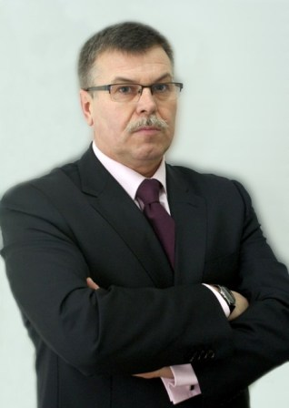 Prof. dr. hab. Jarosław J. Piątek